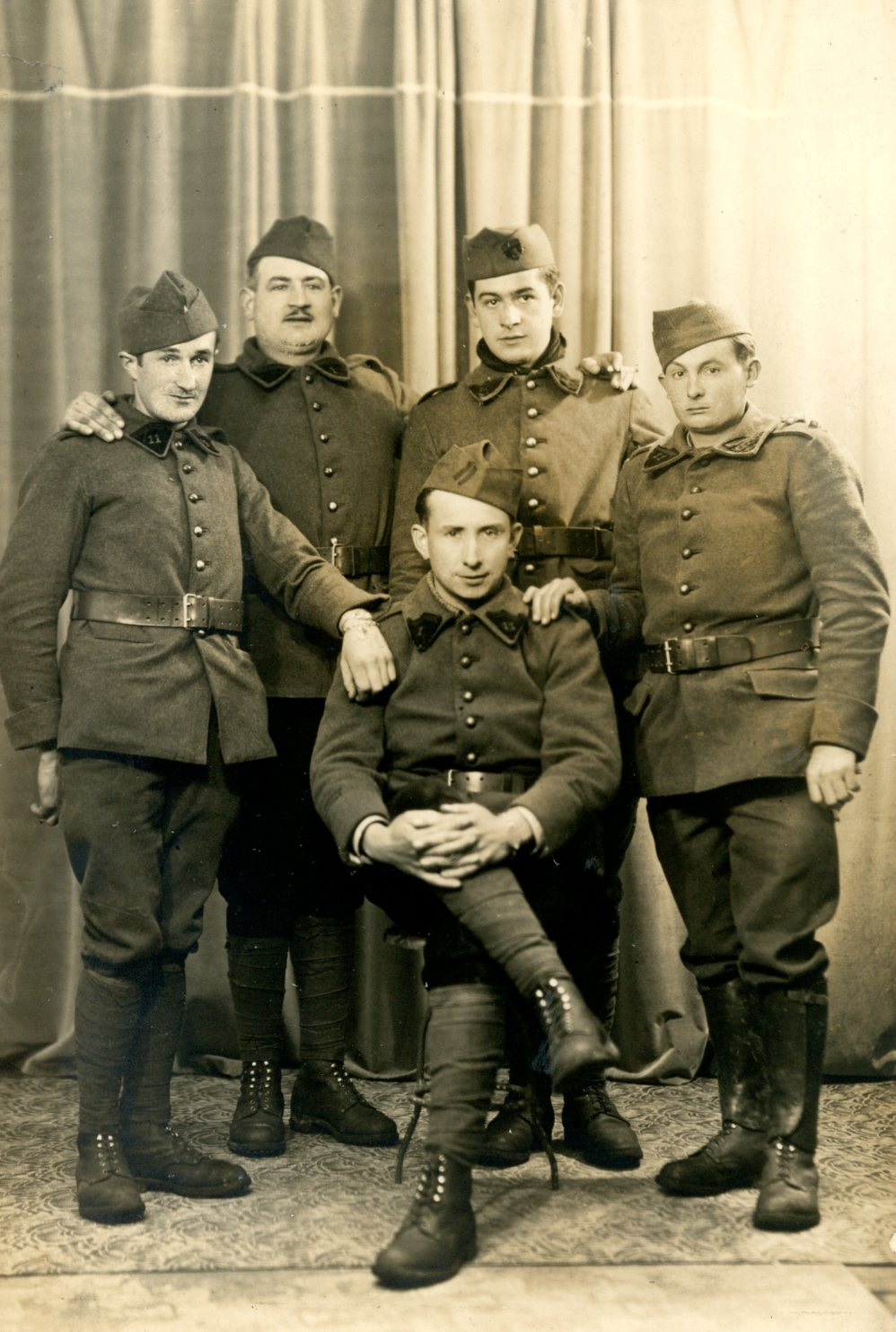 Soldats du 11ème régiment du génie en 1939 1940